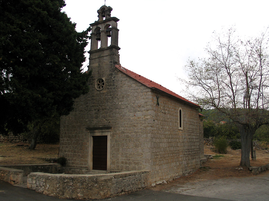 Crkva sv. Ane, Dol na Hvaru